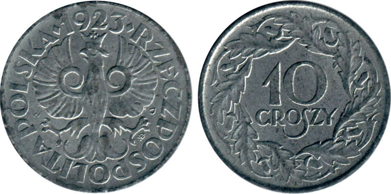 10 groszy 1923 cynk